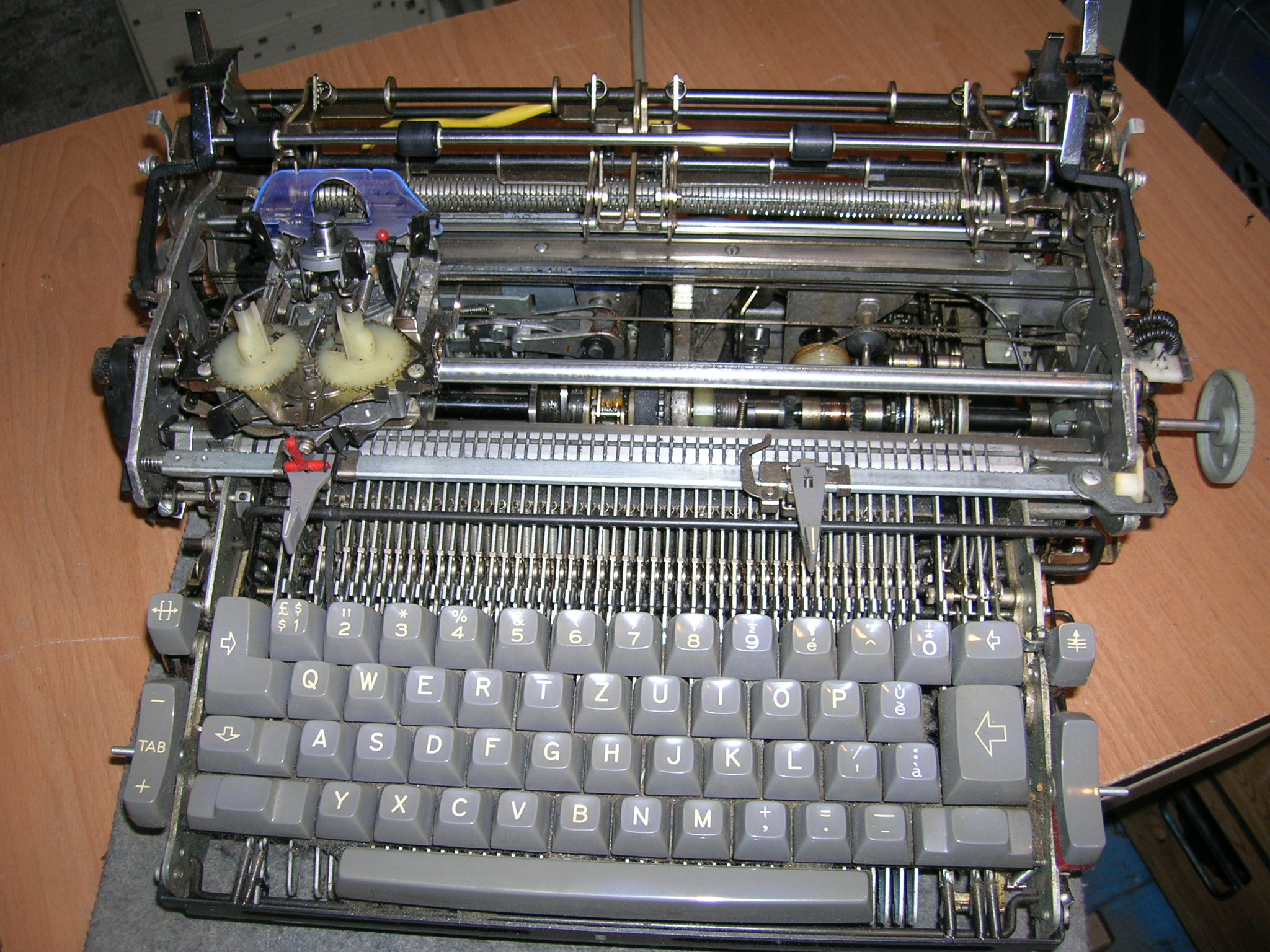 Mécanisme interne IBM 72 à boule: sans le capot, chariot à gauche